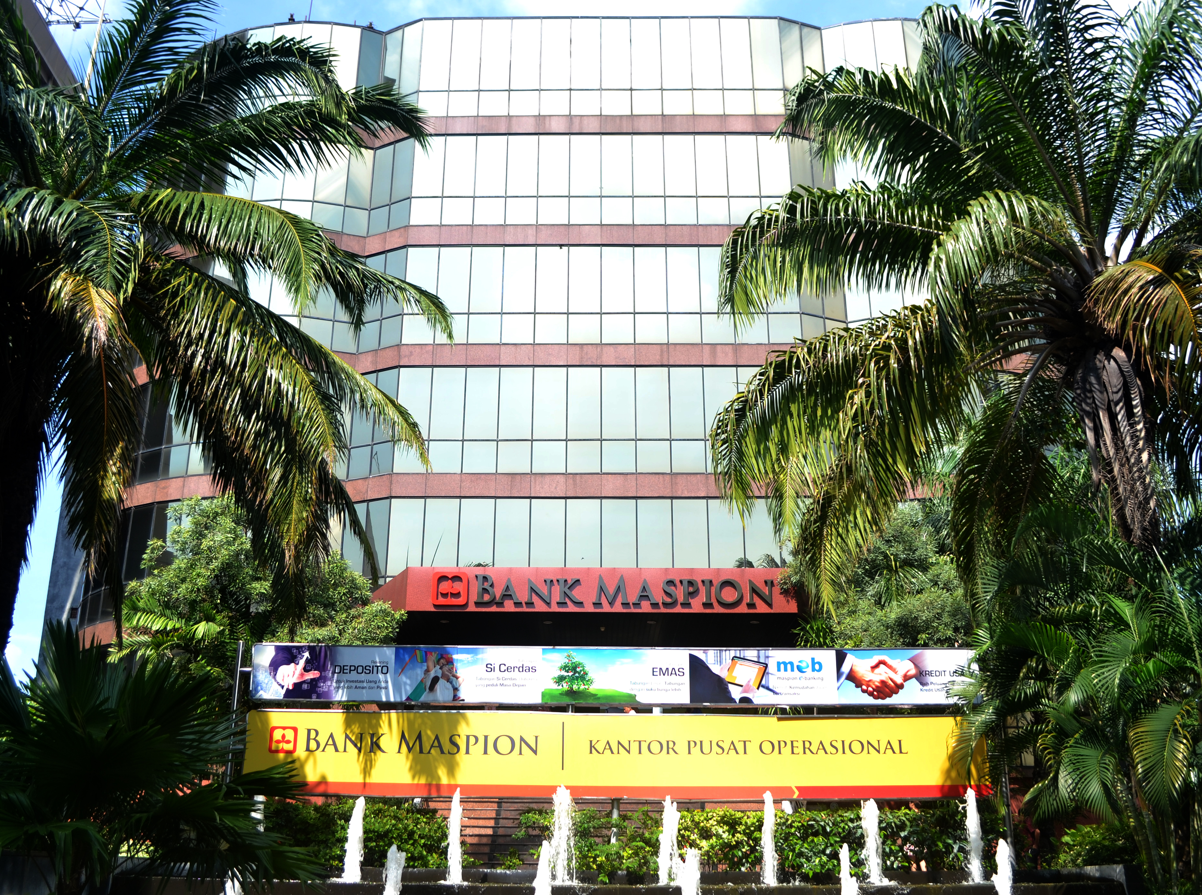 Kantor Pusat Bank Maspion berada di Jalan Basuki Rahmat, Surabaya Pusat. Sumber Foto